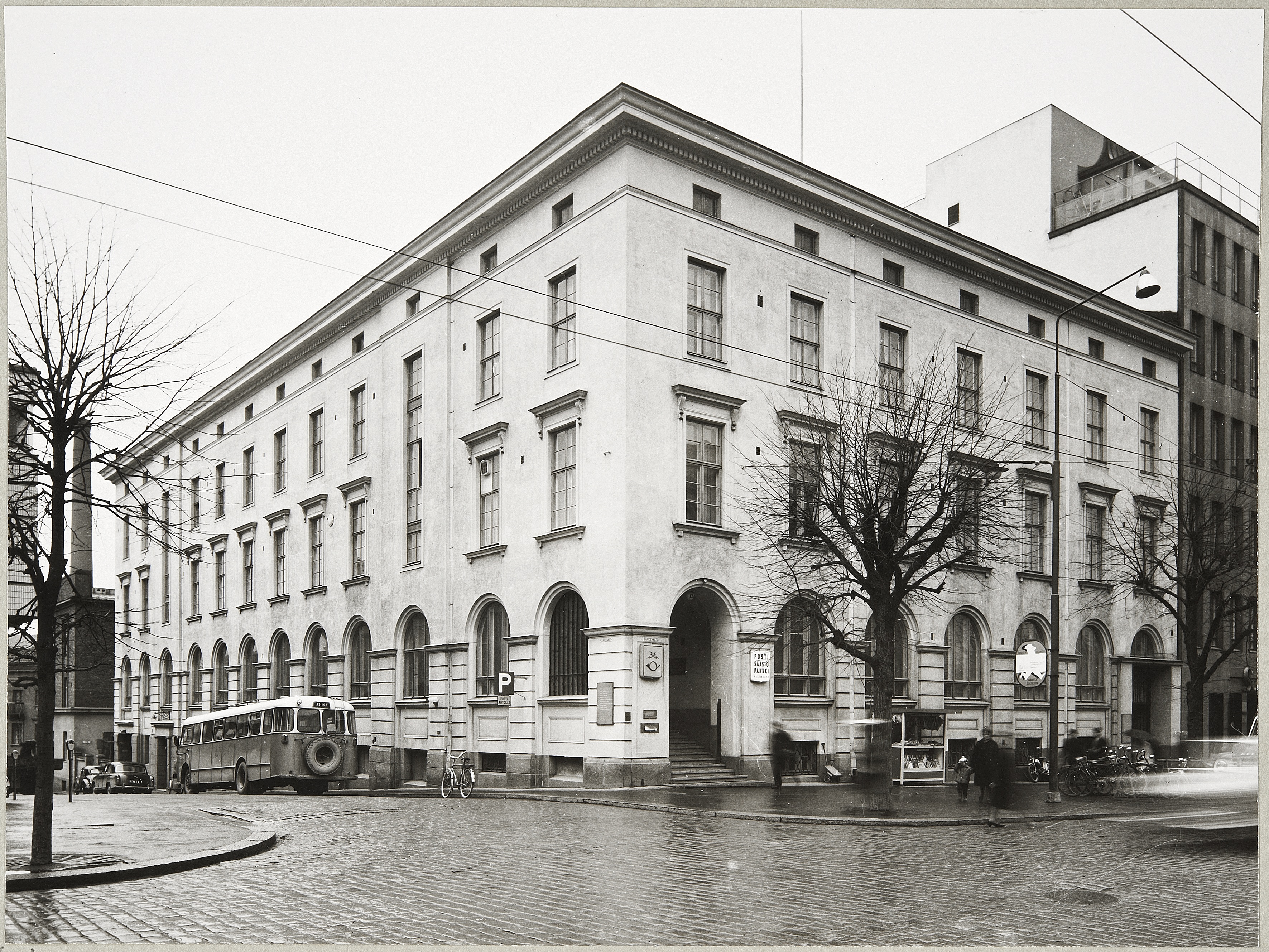 Valokuvassa on Selim Savoniuksen suunnittelema postitalo, joka sijaitsee Tampereella Hämeenkadun ja Pellavatehtaankadun kulmassa (Hämeenkatu 13a). Rakennus valmistui 1927. 1970-luvun alussa tehtiin uusi postitalo Rautatienkadun varrelle.